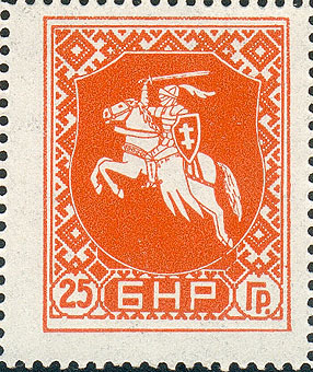 Беларуская (тарашкевіца): Марка Беларускай Народнай Рэспублікі (25 грошаў)